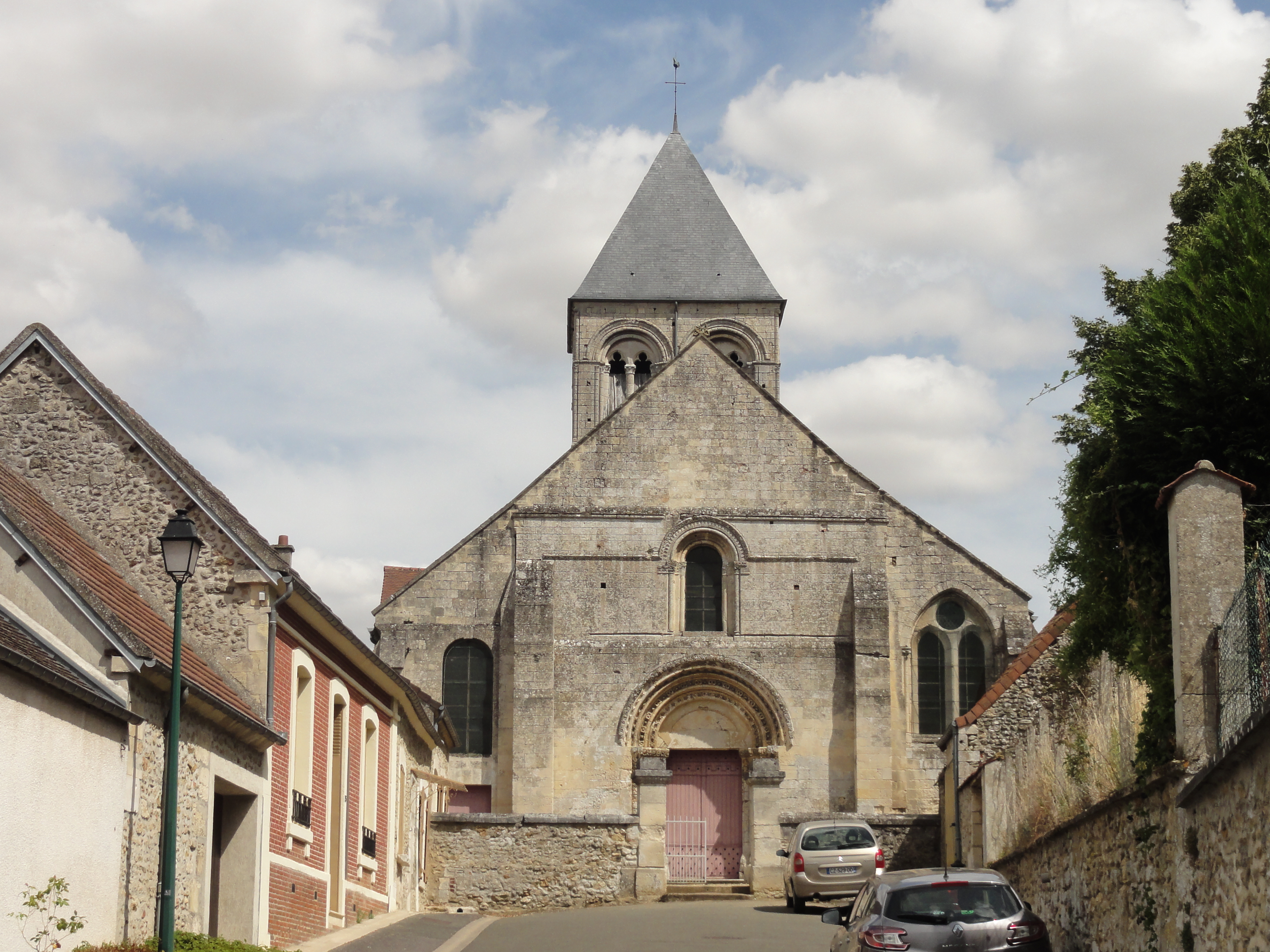 Église Saint-Vast de Nointel (voir titre).